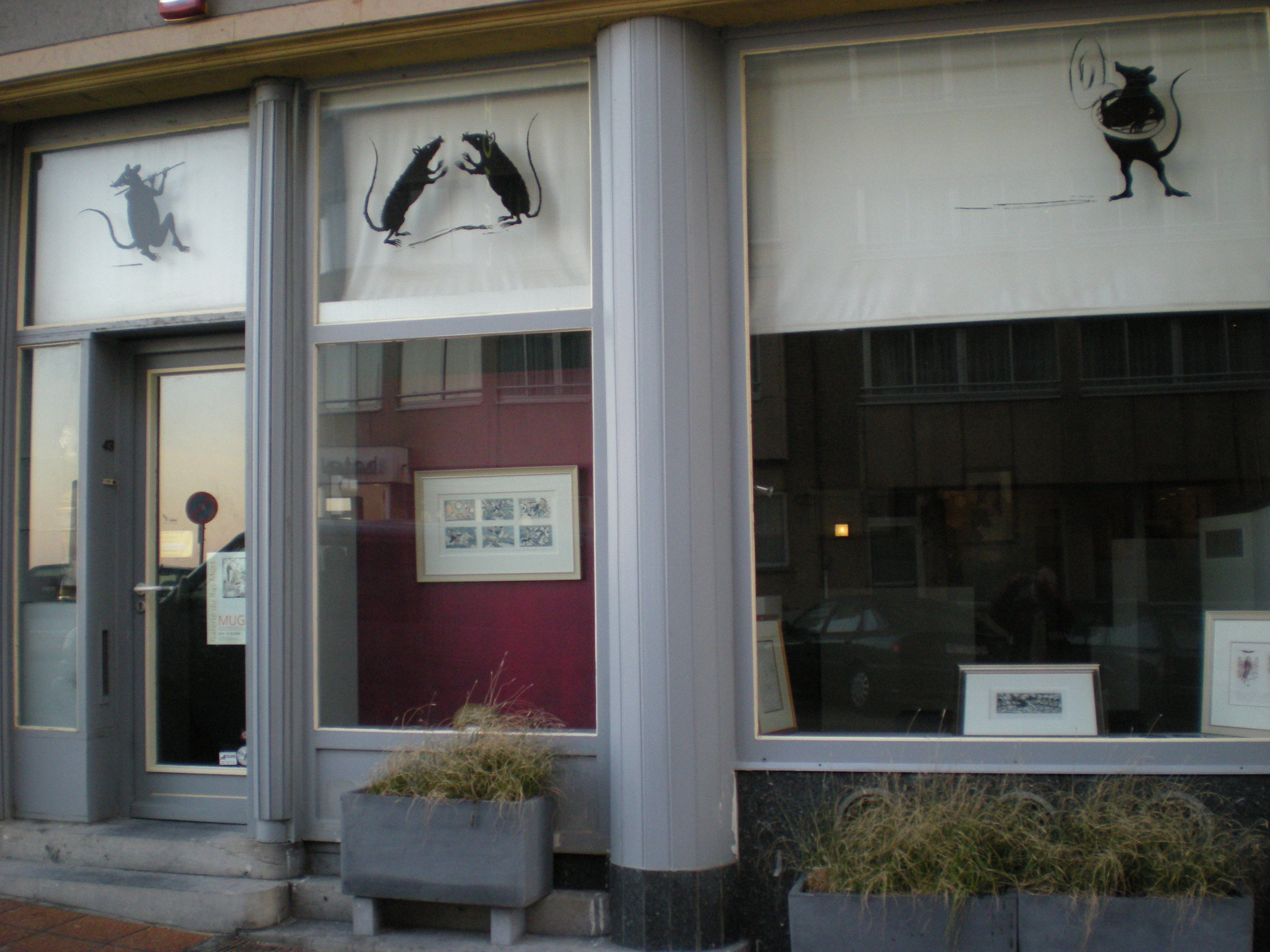 Façade d'une galerie d'art avec des dessins de rats, à Ostende.